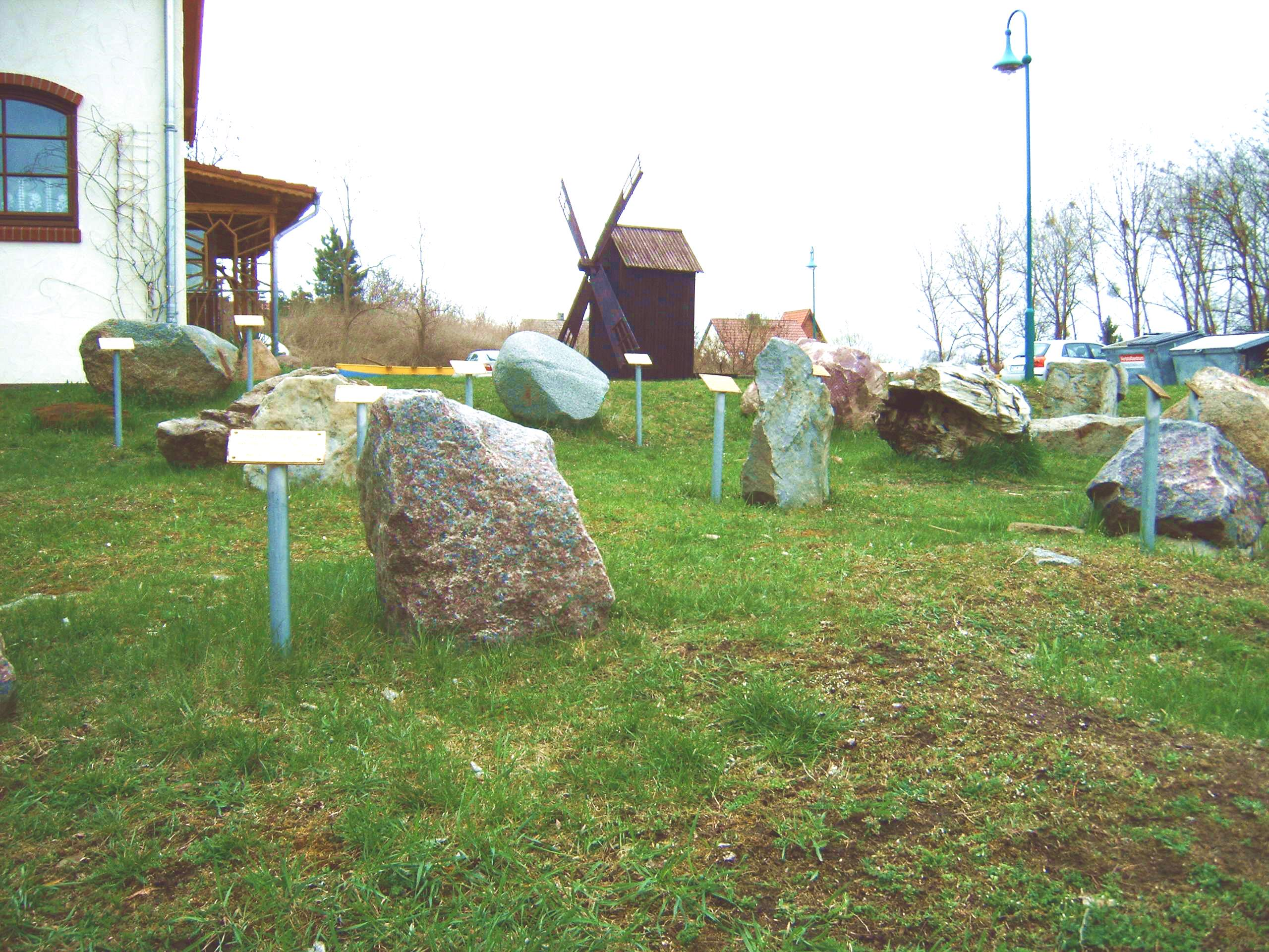 Gesteinsgarten in Gommern, Deutschland Bild aufgenommen am 16.4.2006 von Olaf Meister